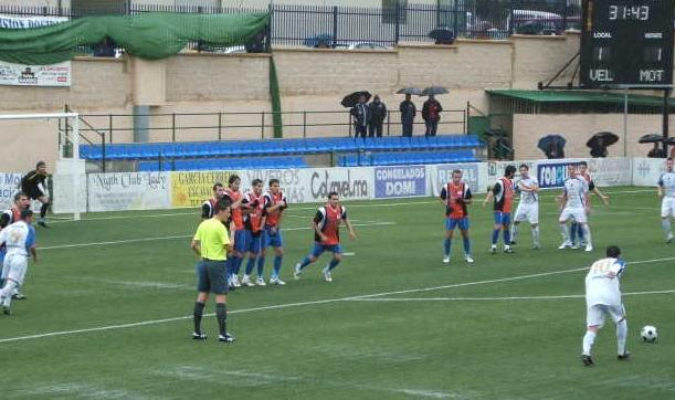 Una foto que hice del equipo.